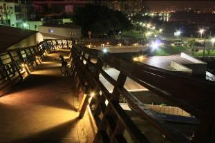 臺北縣八里左岸自行車道